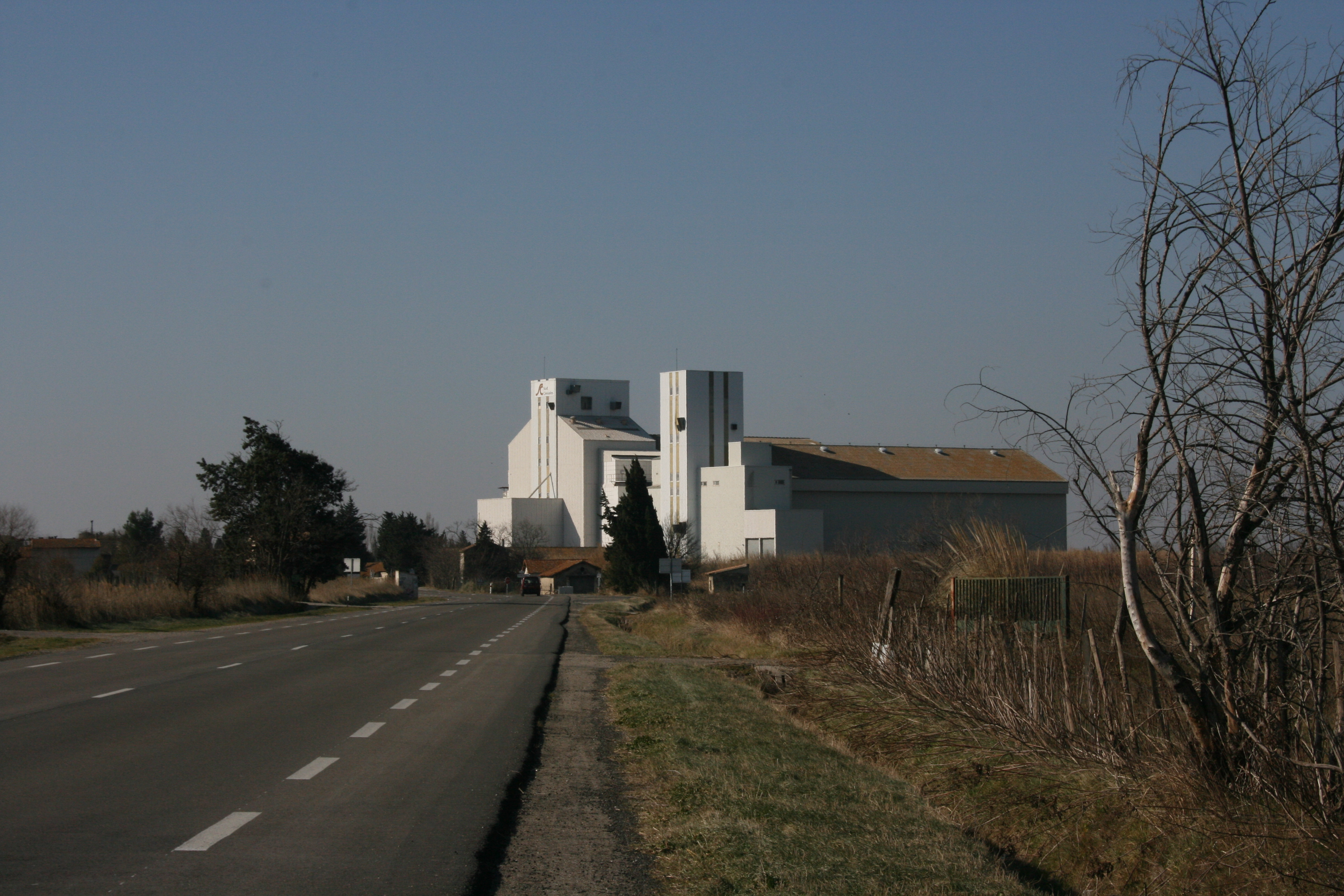 Usine Sud-Céréales en Camargue, sur le terrotoire dela commune d'Arles